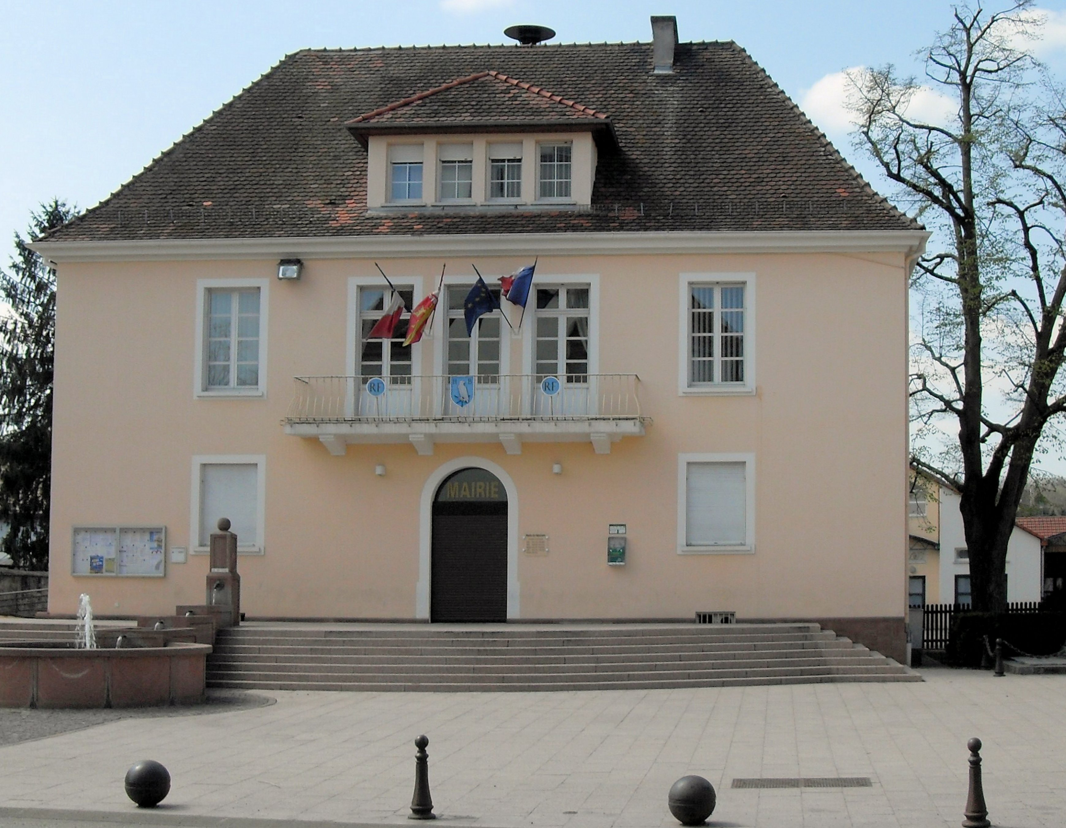 La mairie de Habsheim